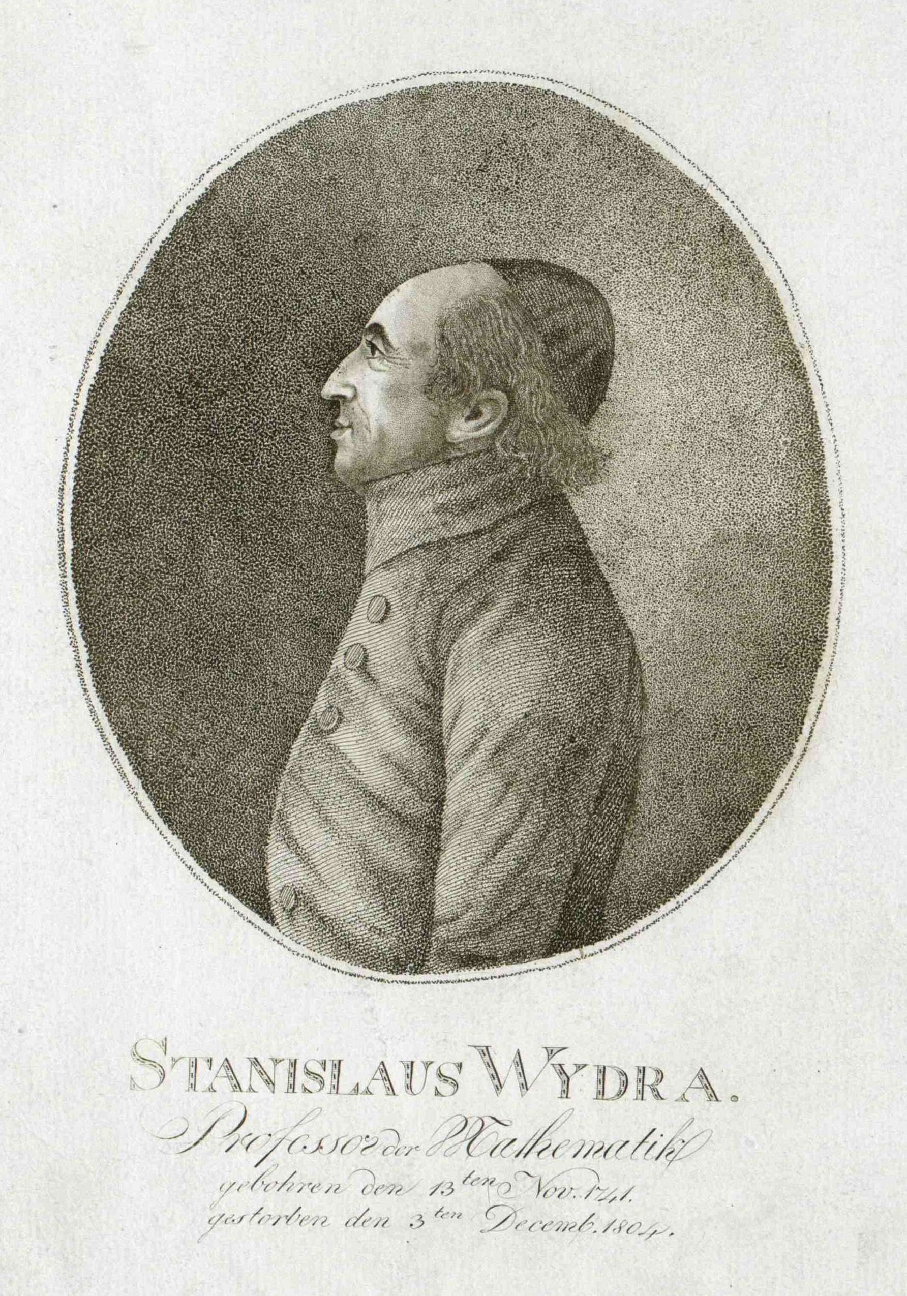 Stanislaus Wydra / Stanislav Vydra Wien, Österreichische Nationalbibliothek, Bildarchiv und Grafiksammlung, Porträtsammlung, Inventar-Nr. PORT_00016413_01